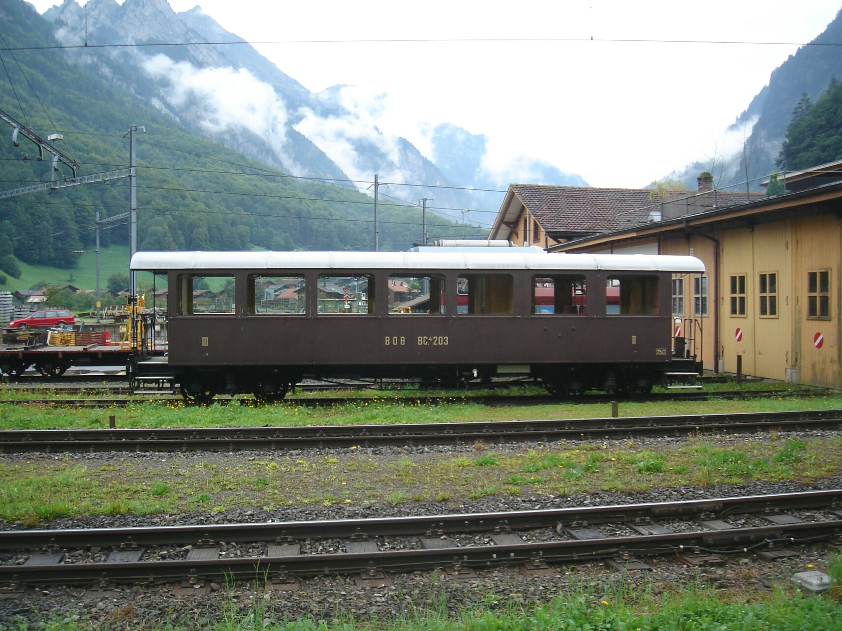 BOB BC 203 im historischen Anstrich in Zweilütschinen